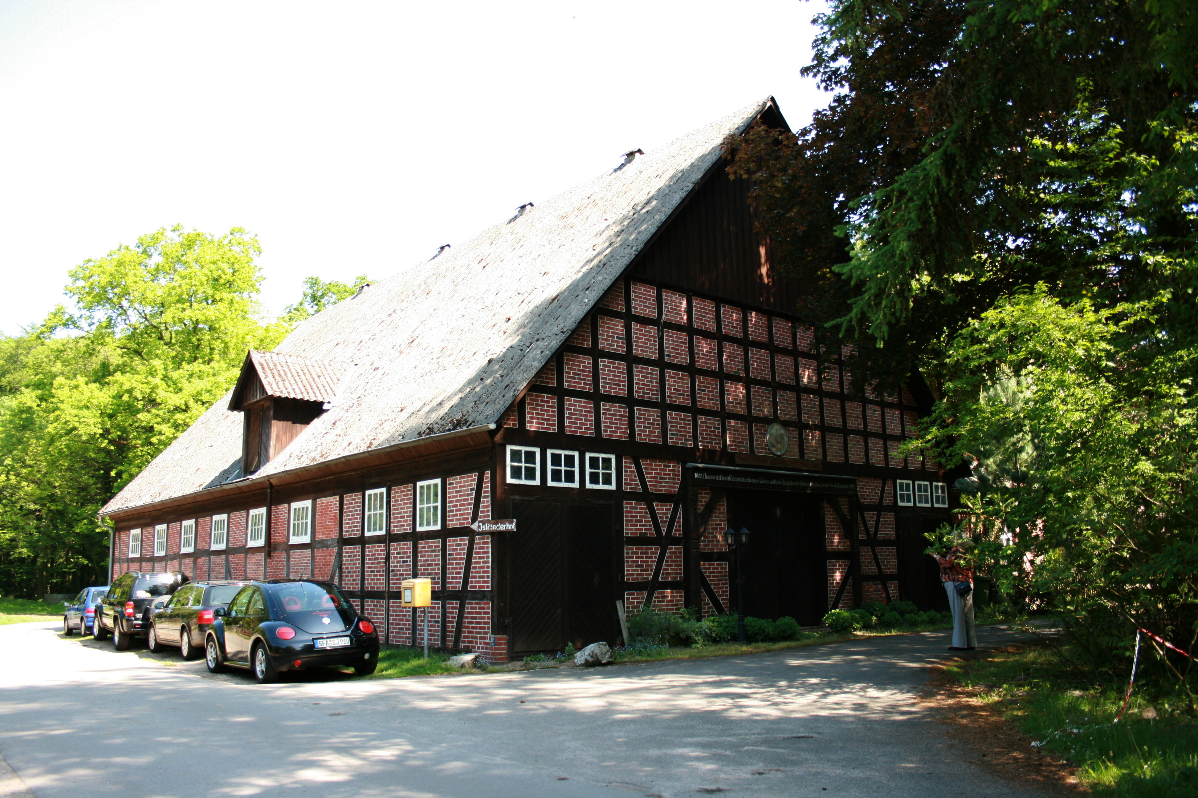 Straße Rutenmühle, Brochdorf, Neuenkirchen (Lüneburger Heide)